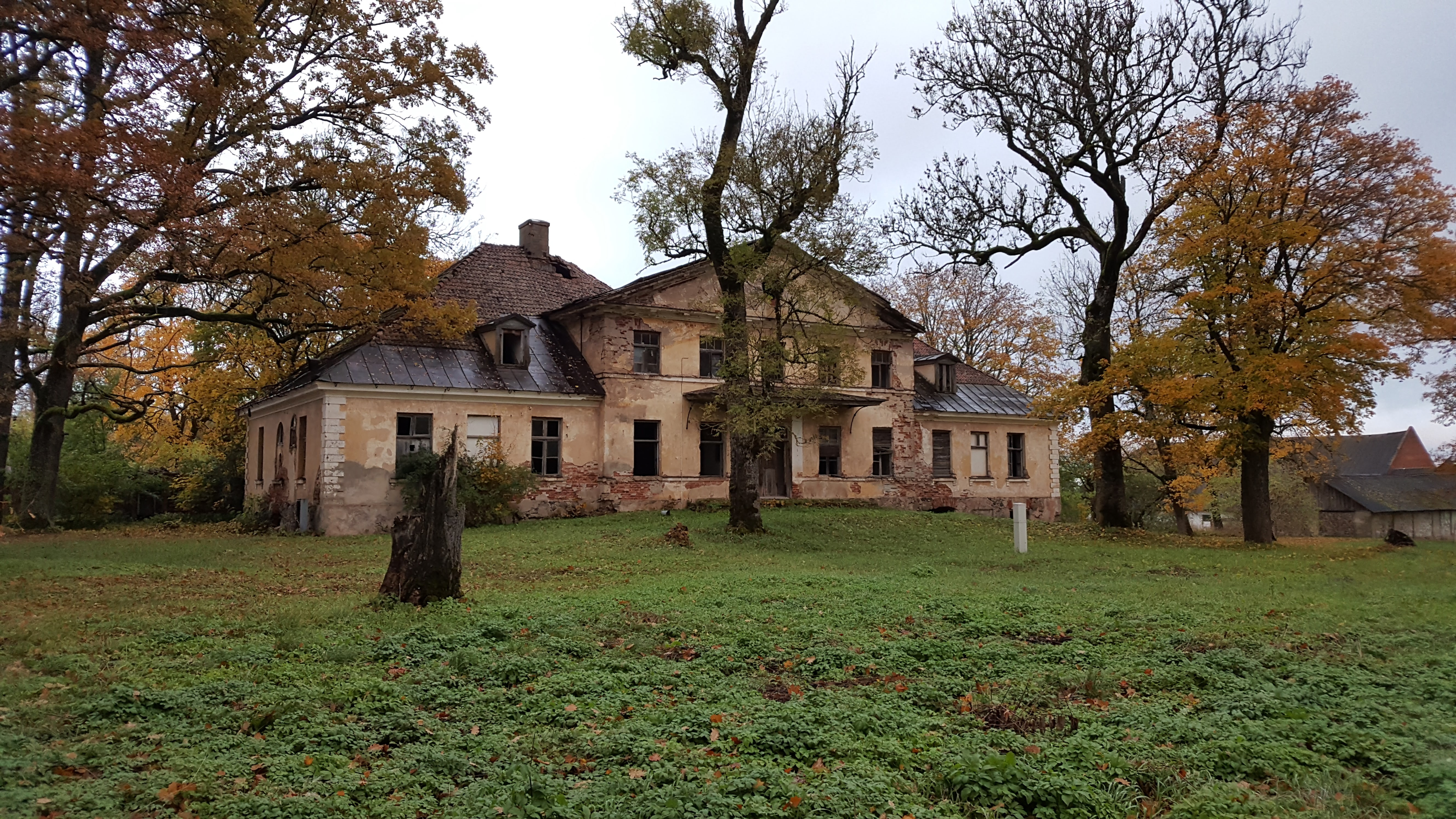 Jaunrauna mõisa peahoone 2017. aastal.